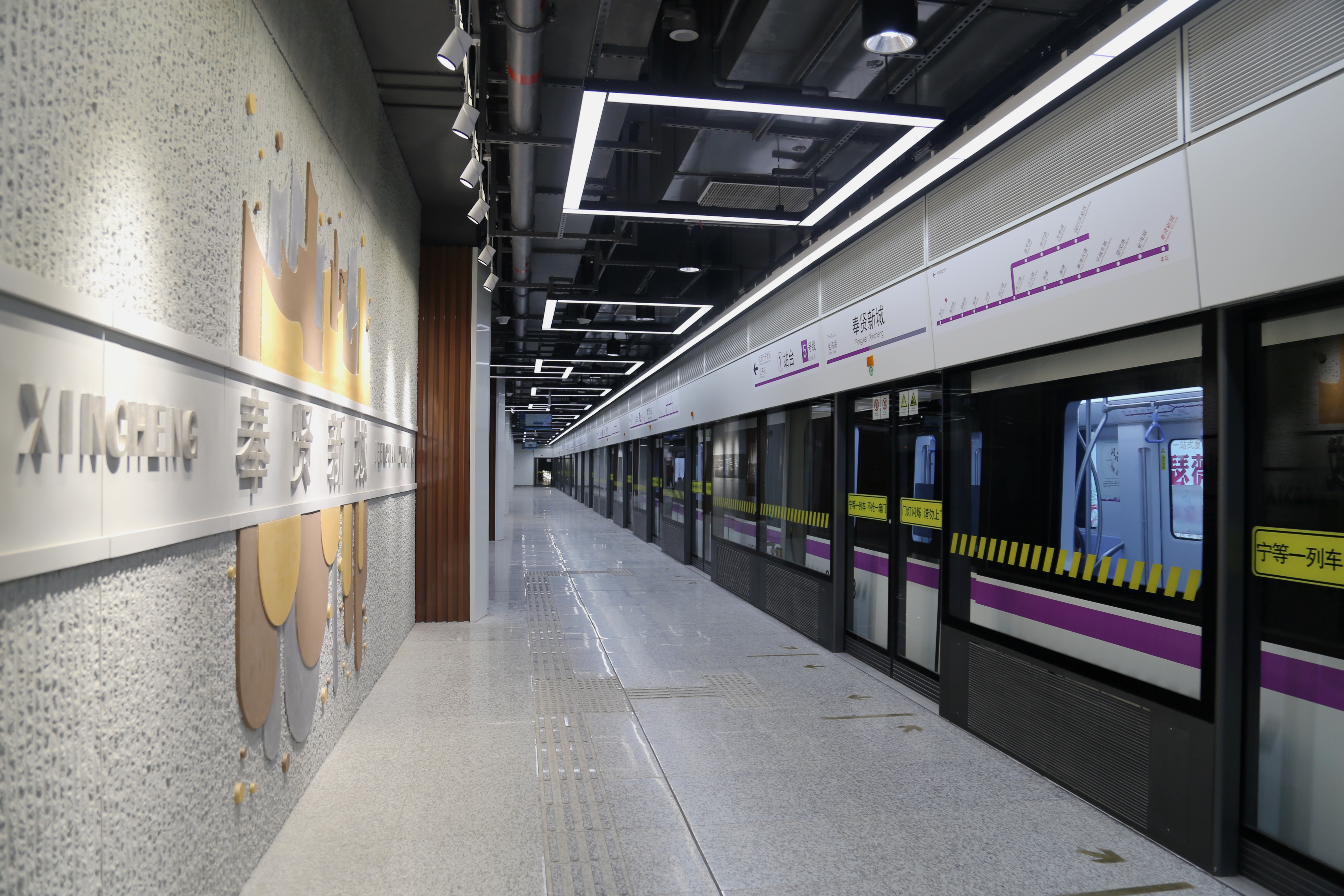 奉贤新城站站台